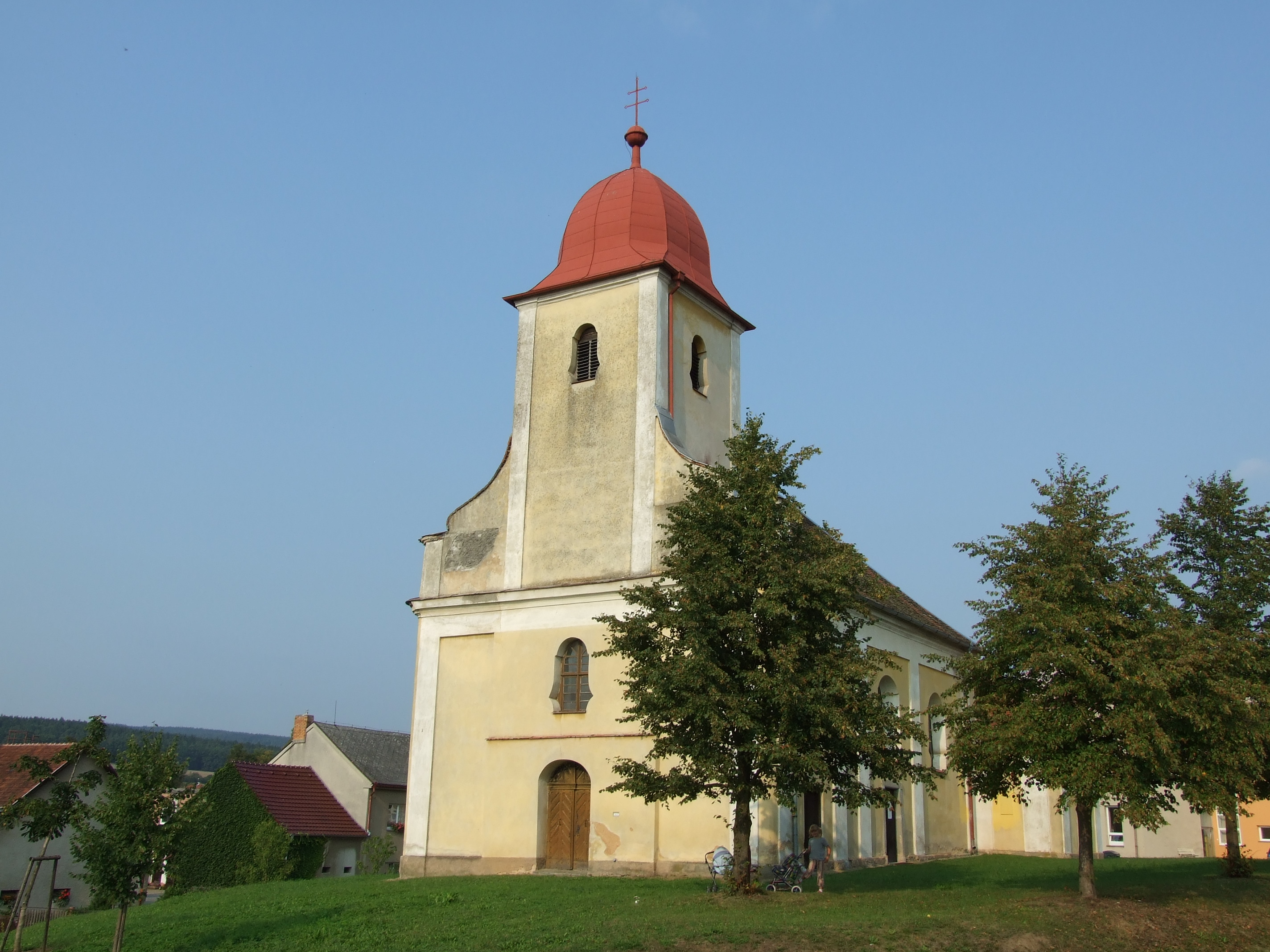 Kostel sv. Bartoloměje (Volduchy), Volduchy, okres Rokycany